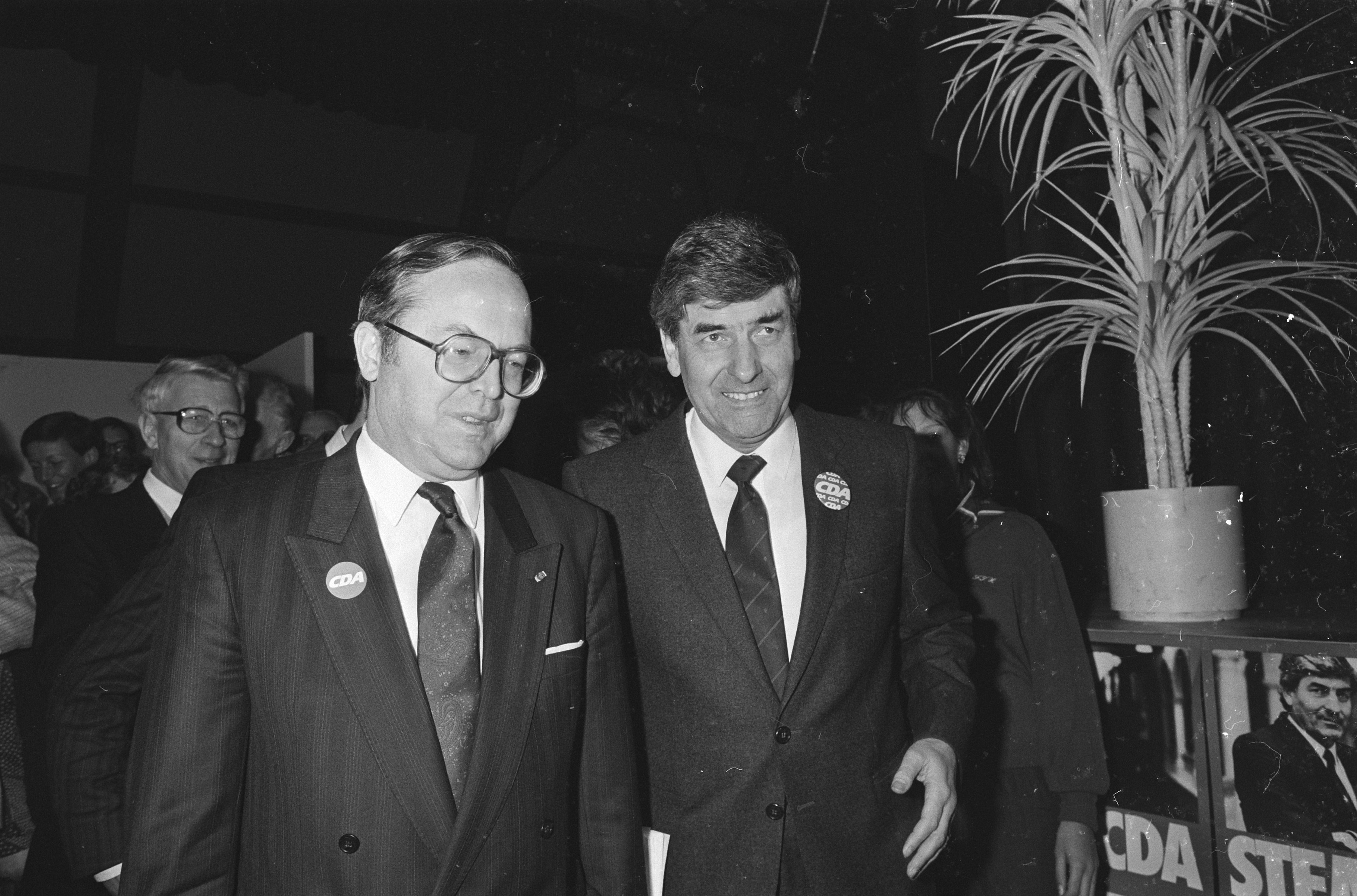 Collectie / Archief : Fotocollectie Anefo Reportage / Serie : Premier Lubbers in Slagharen herkozen als lijsttrekker Beschrijving : Martens (l.) en Lubbers Datum : 1 februari 1986 Locatie : Overijssel, Slagharen Persoonsnaam : Lubbers, Ruud, Martens, Wilfried Fotograaf : Croes, Rob C. / Anefo, [onbekend] Auteursrechthebbende : Nationaal Archief Materiaalsoort : Negatief (zwart/wit) Nummer archiefinventaris : bekijk toegang 2.24.01.05 Bestanddeelnummer : 933-5558